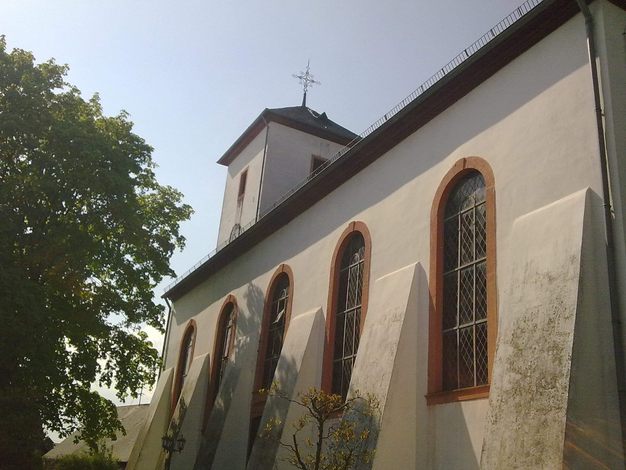 Die evangelische Andreaskirche in Weisel. Turm von Christian Zais